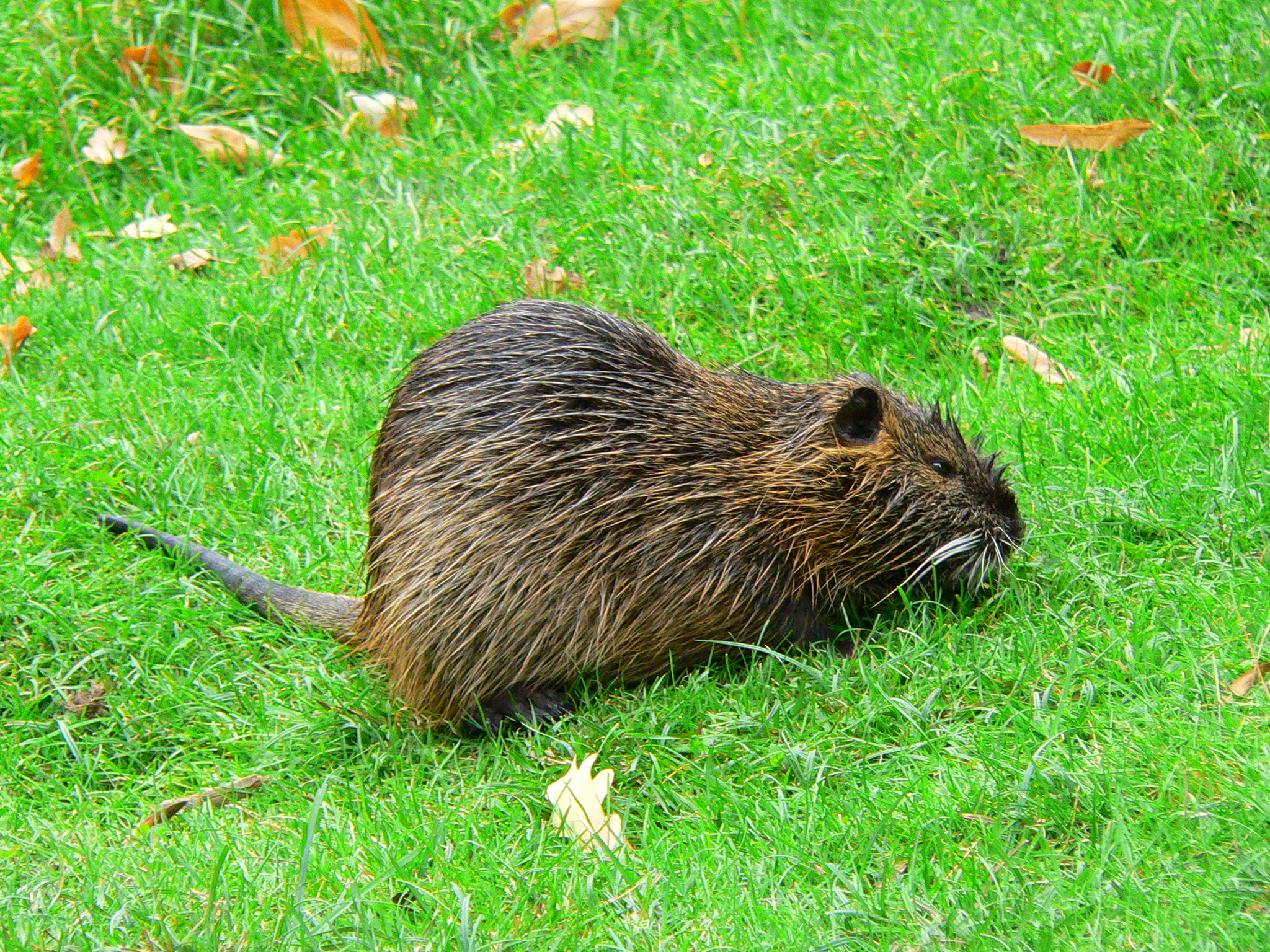 Nutria (Myocastor coypus) mitten in der Stadt Cottbus